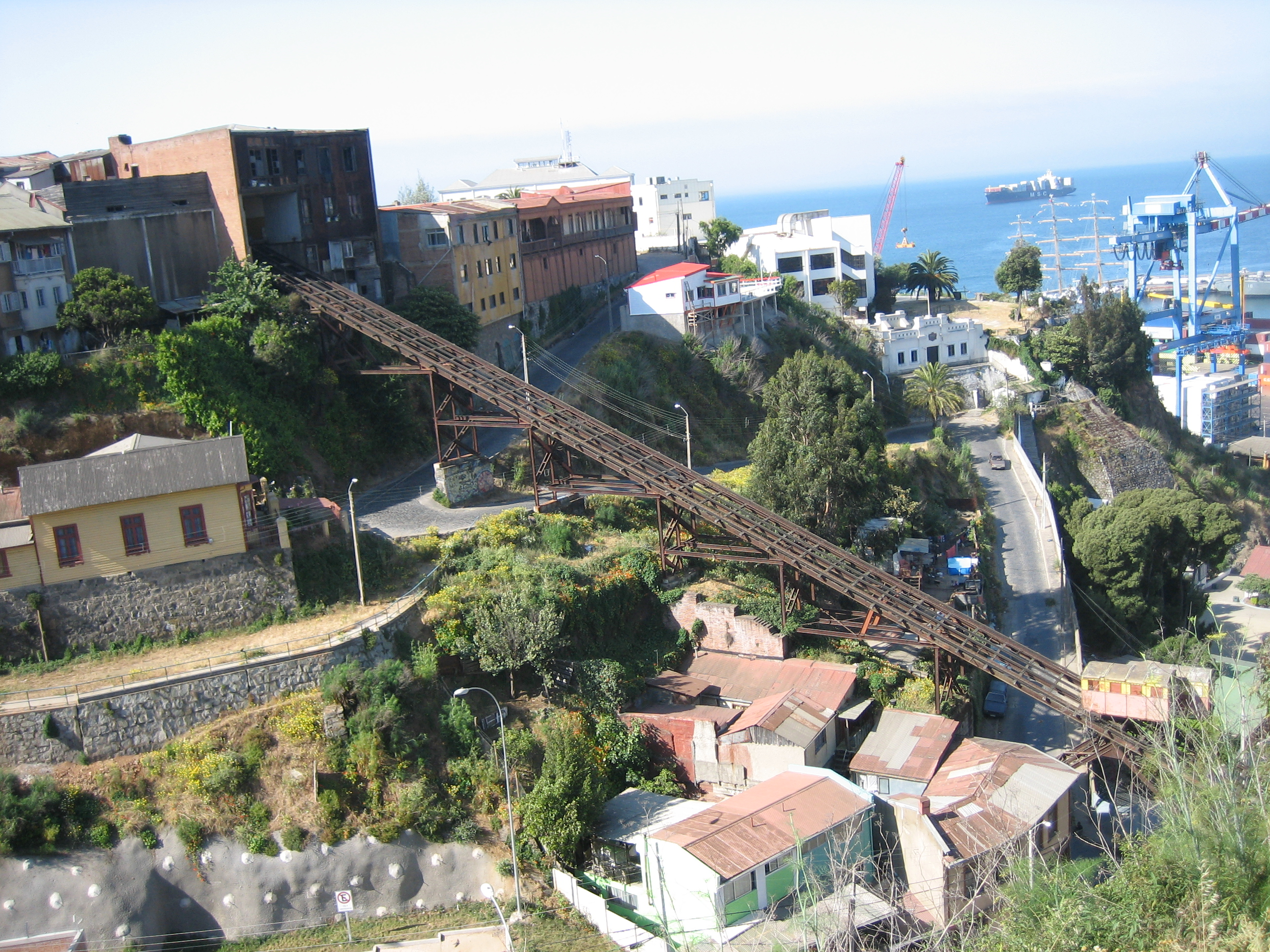 asensor